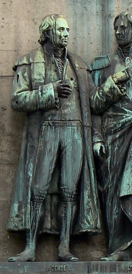 Friedrich Wilhelm III.-Reiterstandbild auf dem Kölner Heumarkt. Detail: Statue des Heinrich Theodor von Schön.